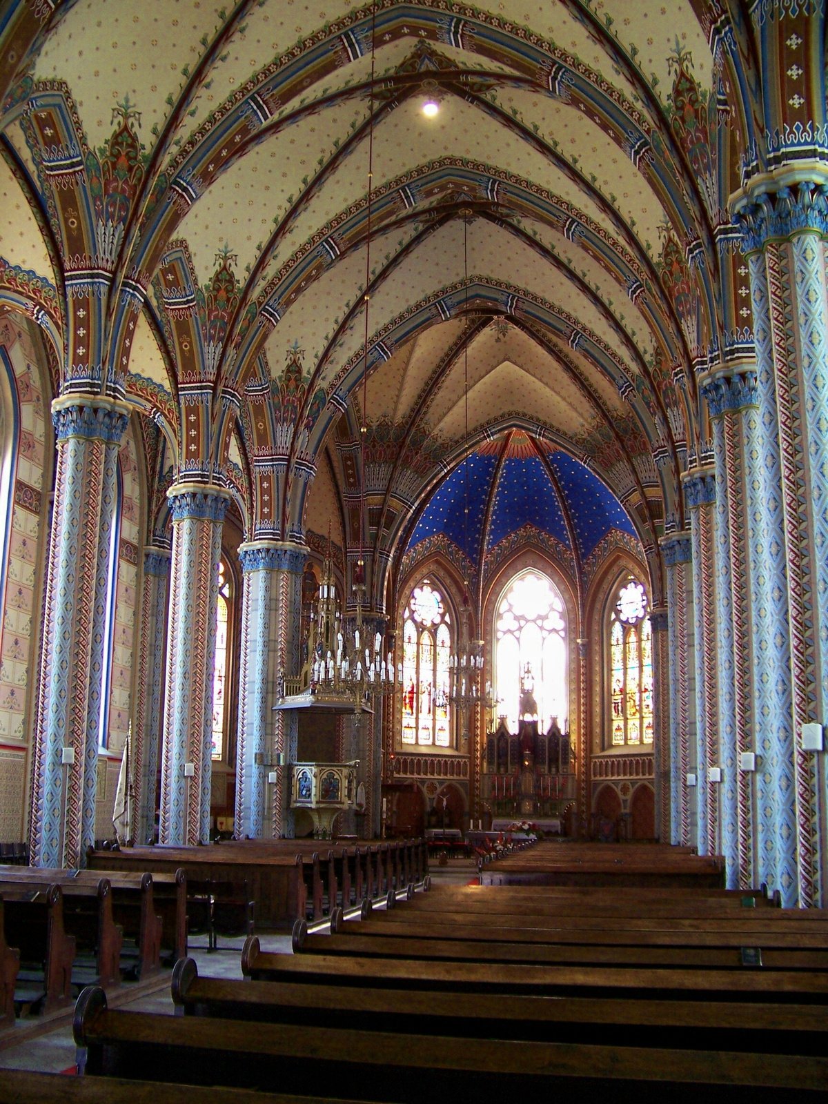 R.k. templom (Kőszeg, Fő tér) This is a photo of a monument in Hungary, Identifier: 9040